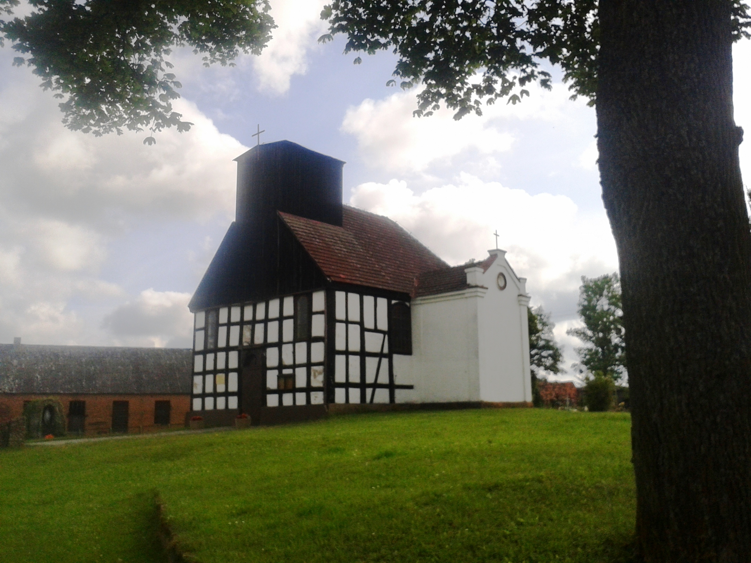 Worowo (gmina Łobez) - ryglowy kościół z 1707 r. p.w. Imienia Marii, z drewnianą wieżą.